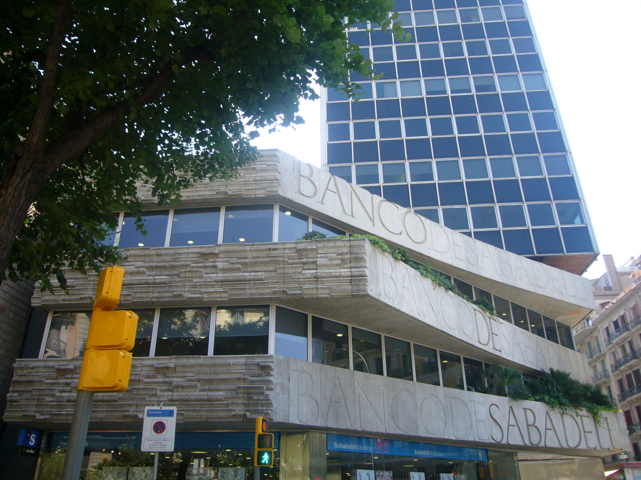 Edifici del Banc de Sabadell, al Carrer del Rosselló, 216 cantonada amb Rambla de Catalunya. Relleus de Josep Maria Subirachs, realitzats el 1971